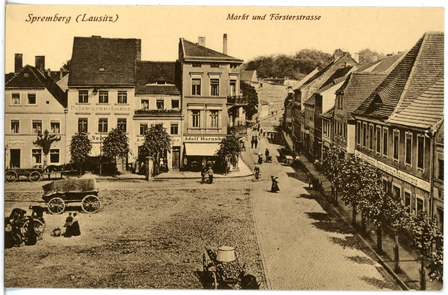 Spremberg; Markt mit Försterstraße This postcard is from publisher Brück & Sohn in Meißen ( postcard has a unique number 20950 and is available in a higher resolution at the publisher. This images was uploaded in a cooperation project between Wikipedians and the publisher.